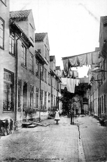 Römisches Reich, Mühlenstr. 61, vor 1914